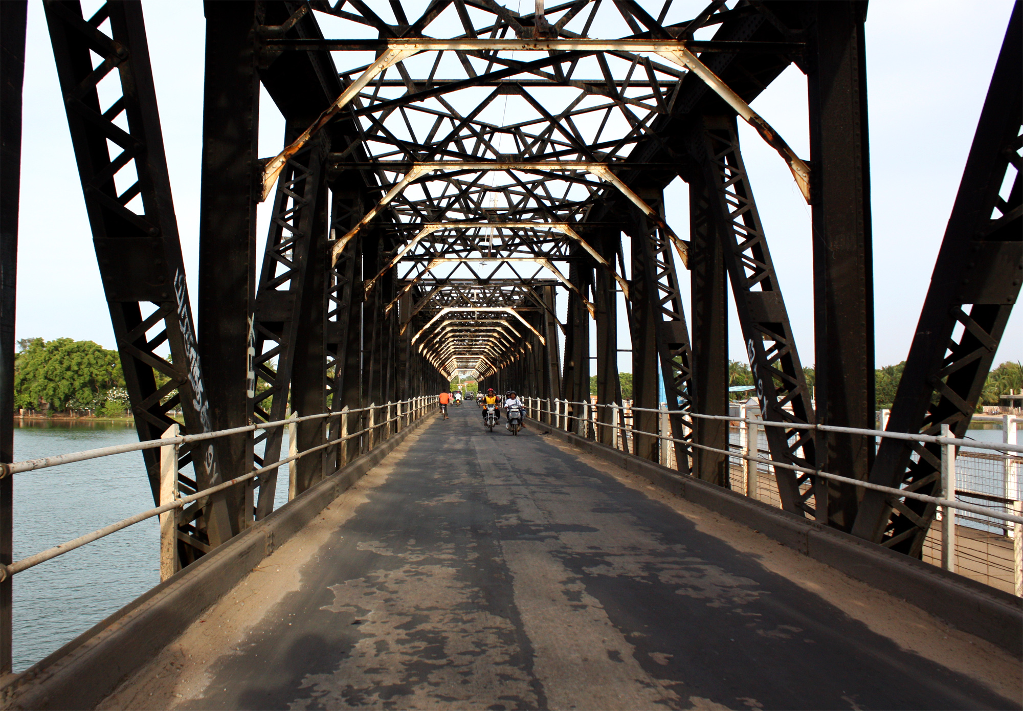 கல்லடிப் பாலம் (மட்டக்களப்பு) - உட்புறக் காட்சி